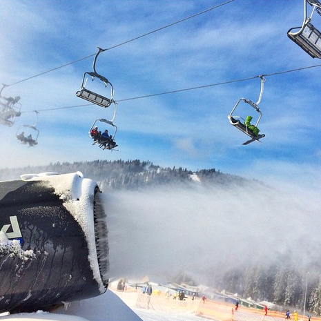 Снежная пушка горнолыжного курорта Буковель